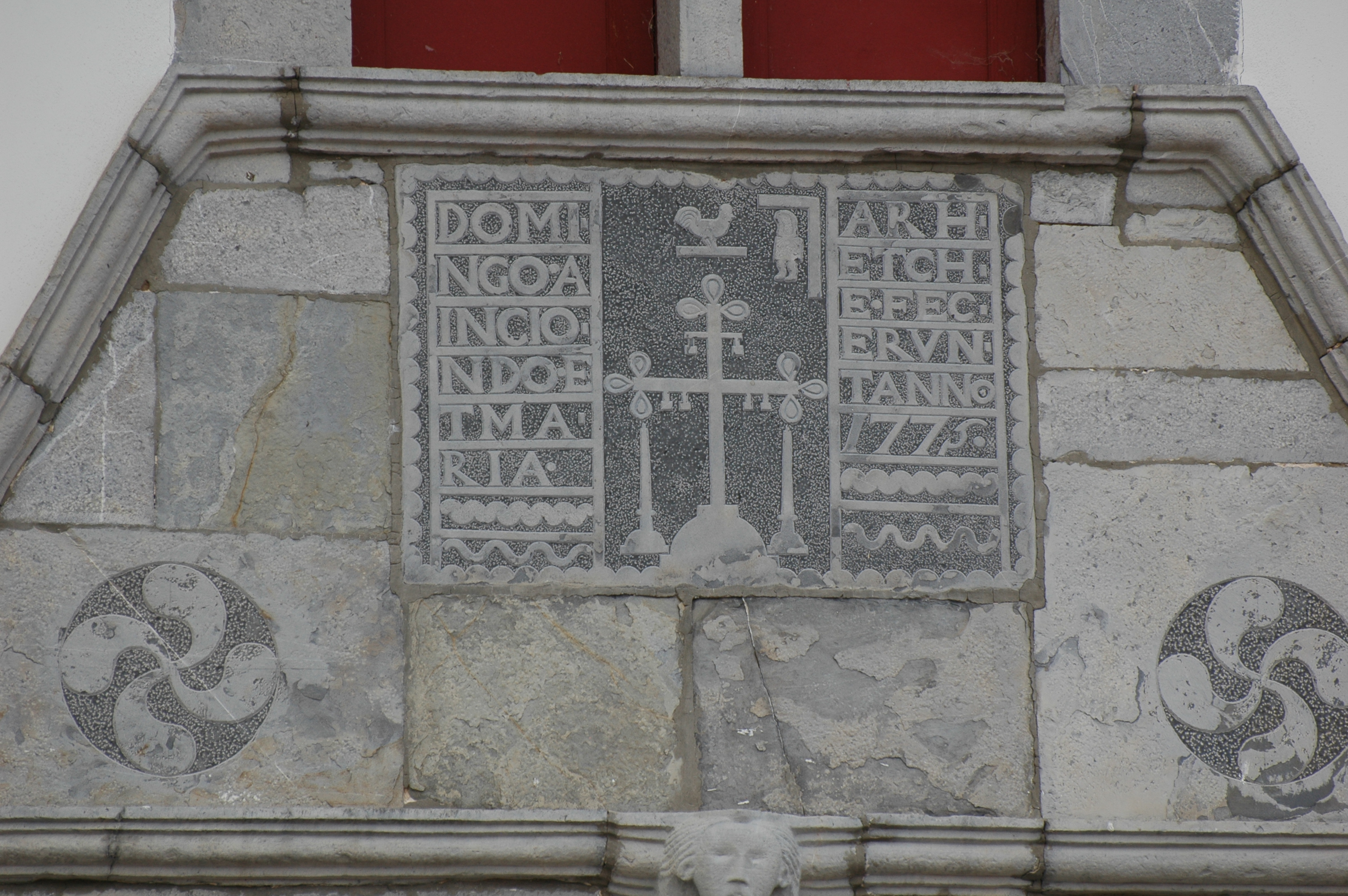 Armendarits, linteau sculpté. Text: "Domingo Ainciondo et Maria Arhetche fecerunt anno 1775", c'est à dire, Domingo Ainciondo et Maria Arhetche l'on fait l'anné 1775.